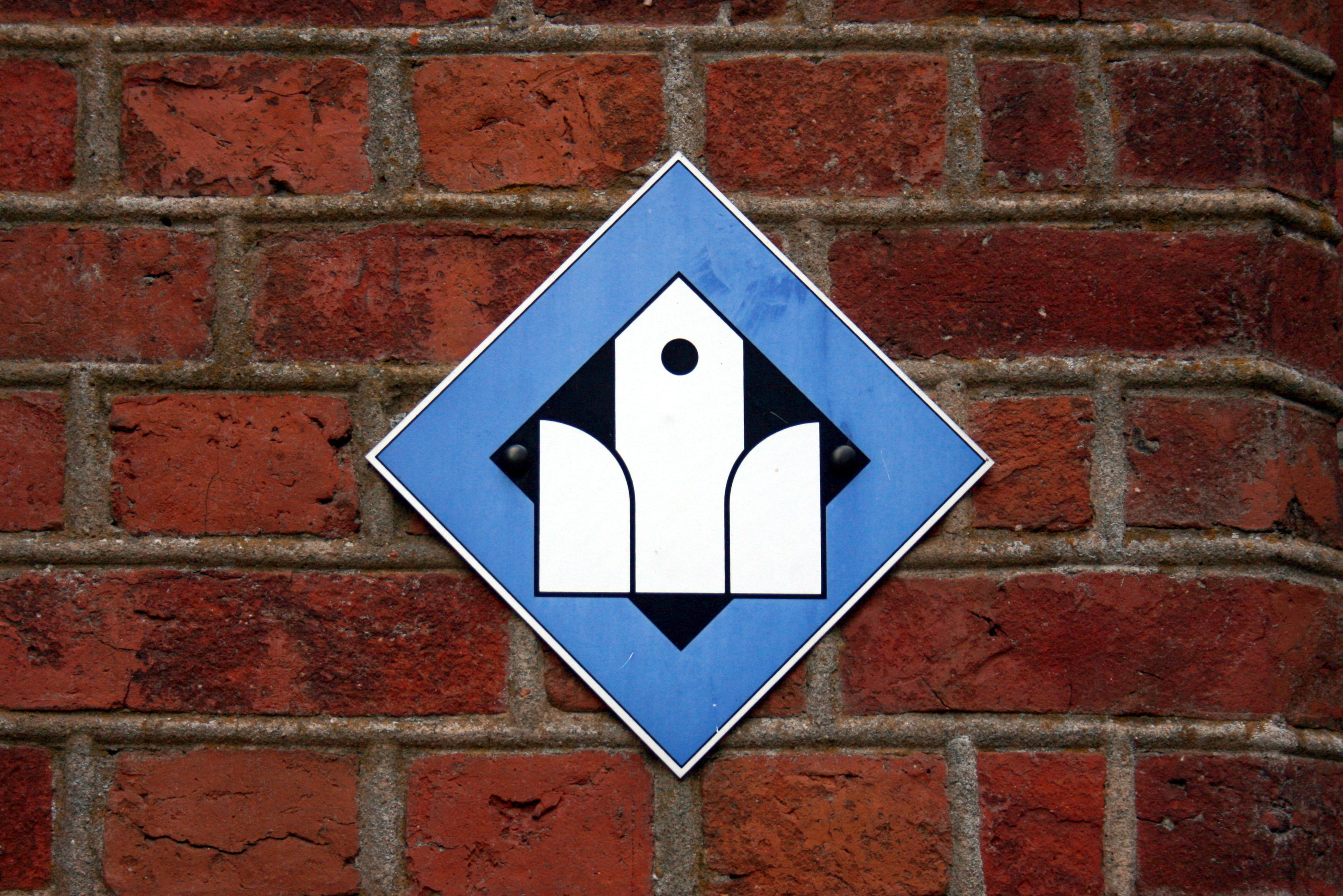 Kirche St. Peter und Paul, Friedenstraße in Schneverdingen